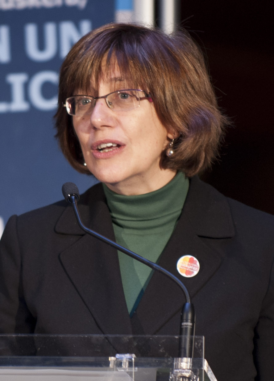 Castellano-euskera en un click